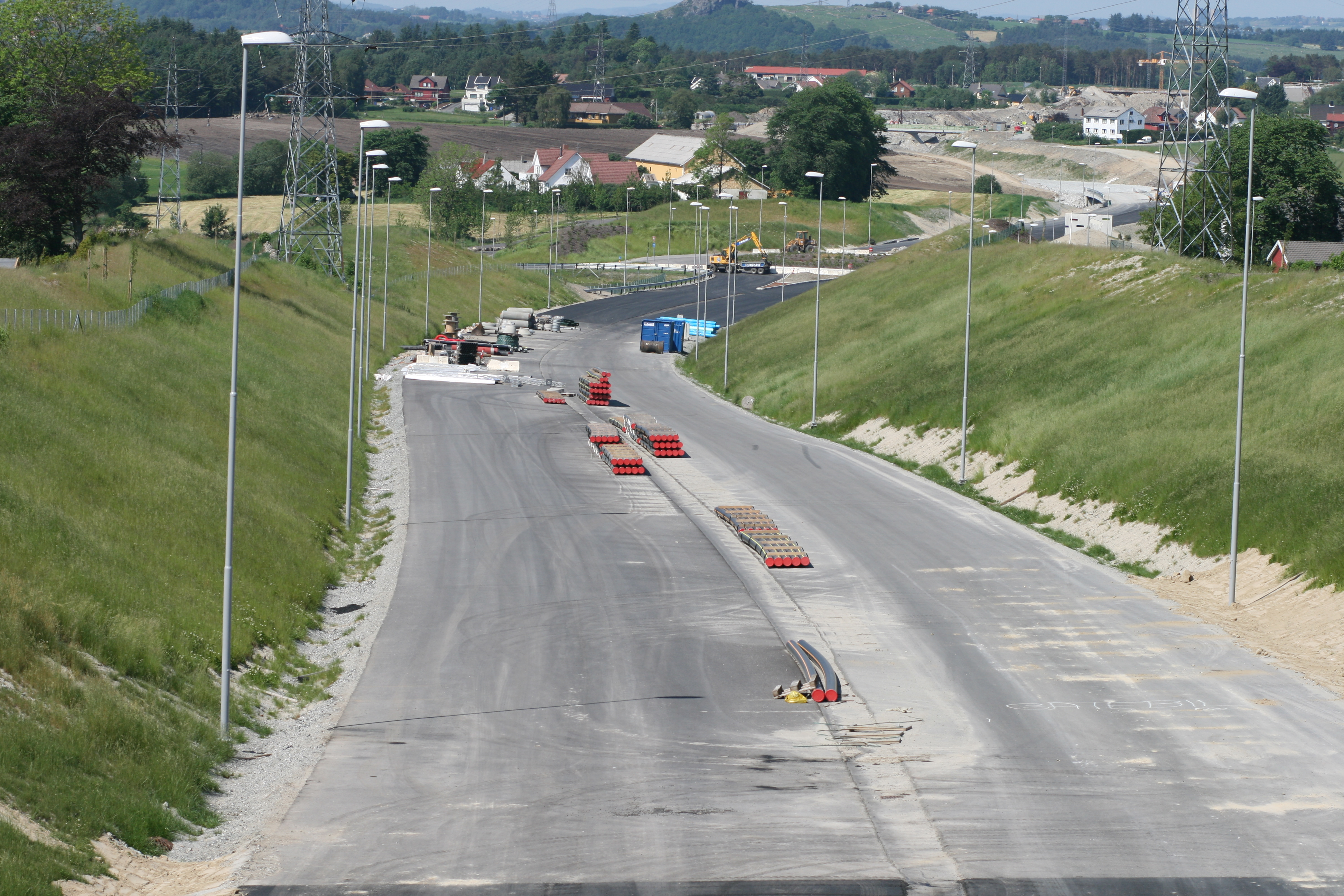 RV 44 at Stangaland